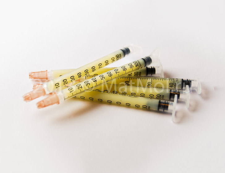 Свежее маточное молочко упакованное в медицинские шприцы